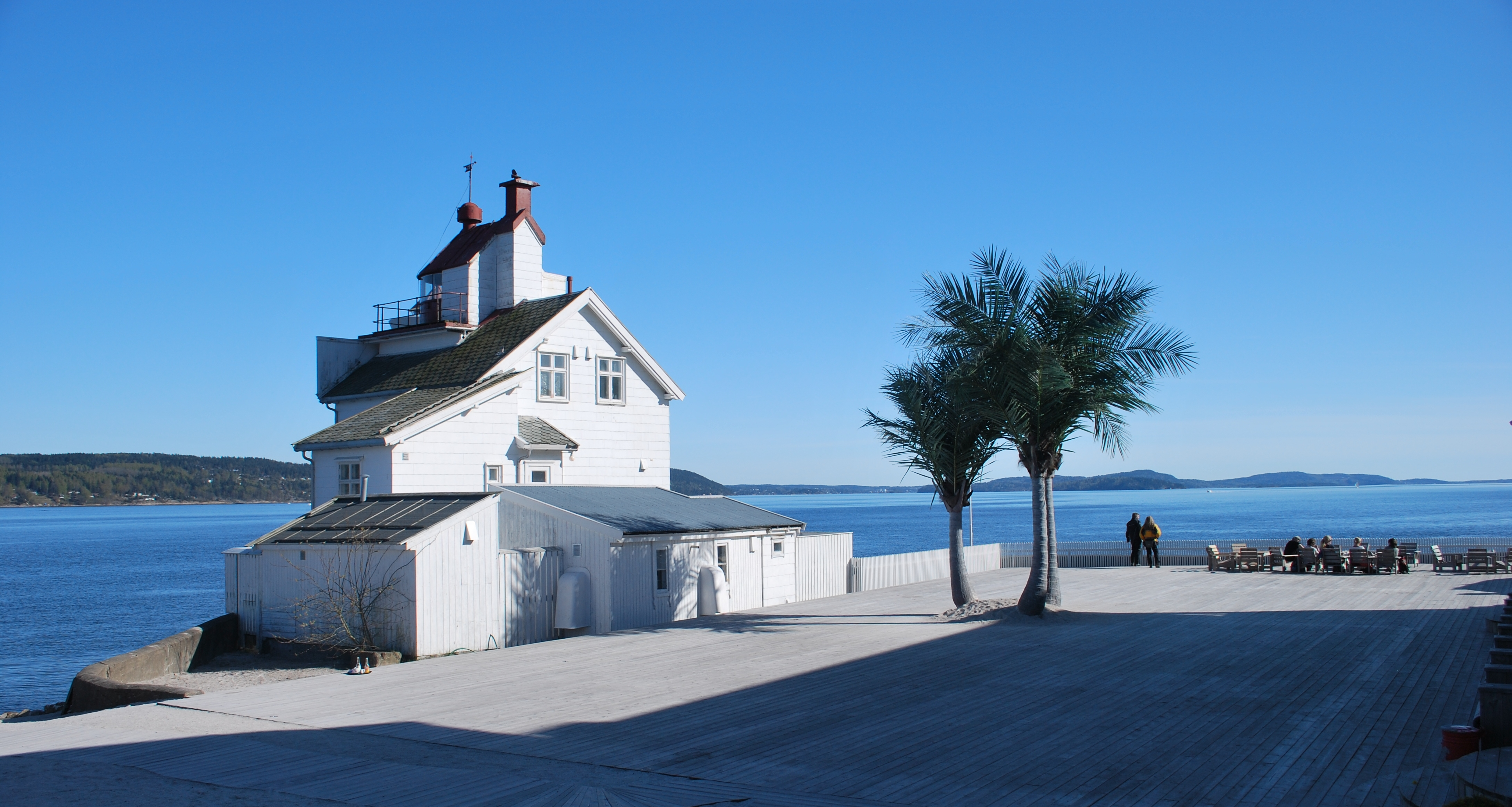 Filtvet fyr sett fra hjørnet av hotellbygningen, i dag restauranten Villamalla